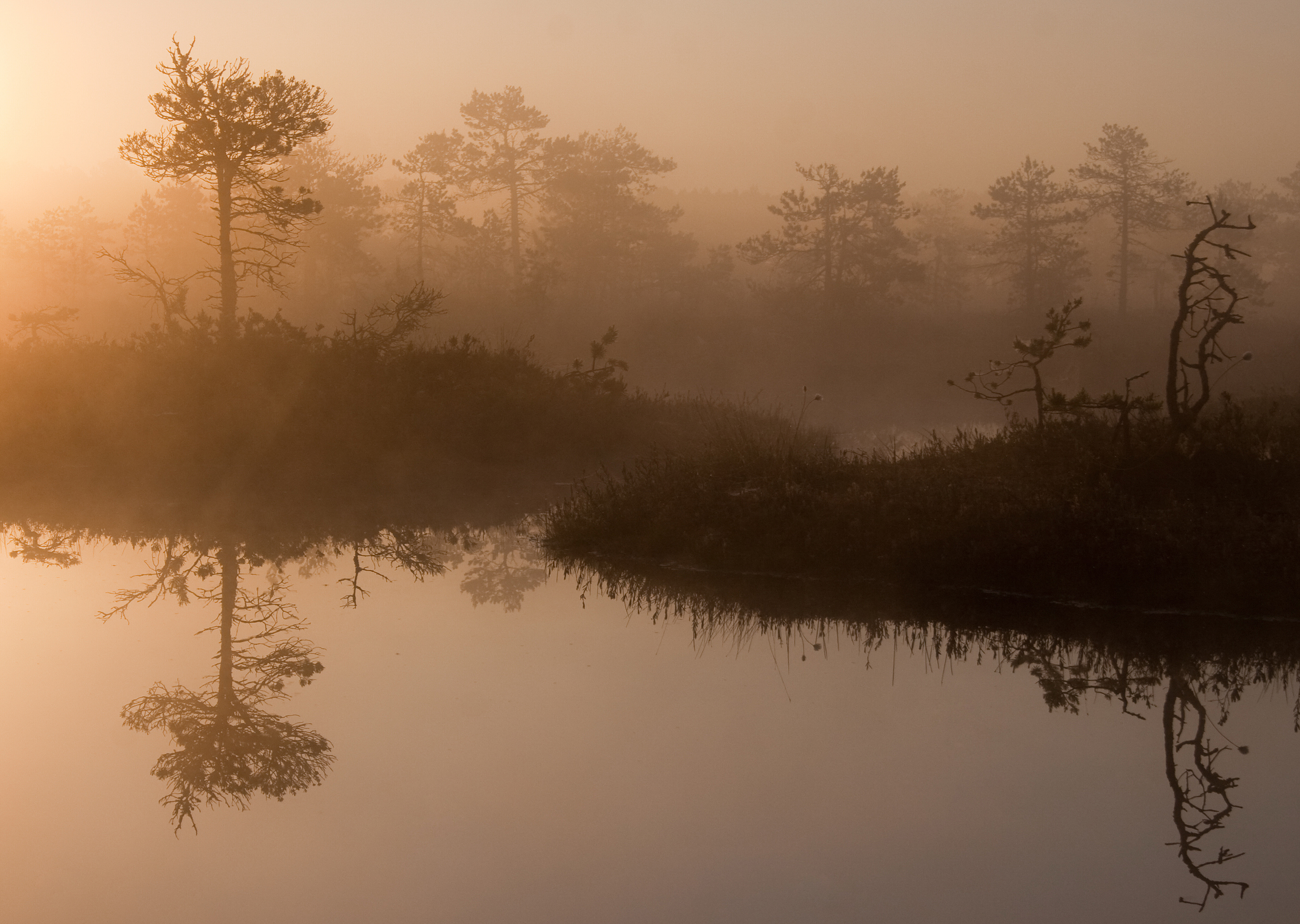 Endla looduskaitseala asub Kesk-Eestis Pandivere kõrgustiku lõunanõlval, Põltsamaa jõe keskjooksu alal. Foto on pildistatud Endla Looduskaitsealal Männikjärve rabas varajasel hommikutunnil.